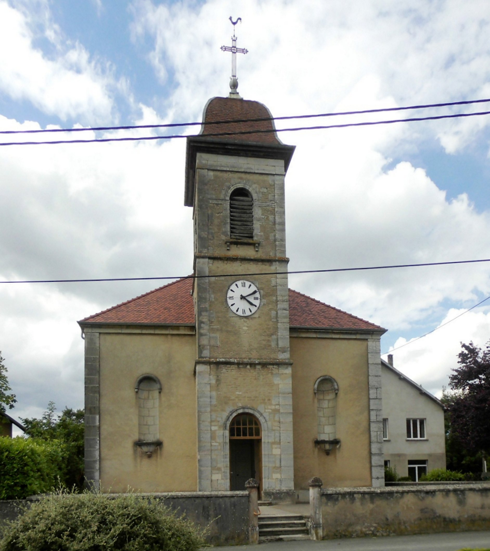 L'église Sainte-Anne de Bourguignon